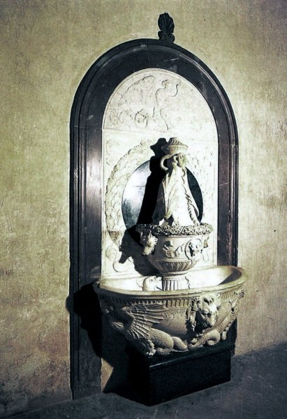 Lavabo